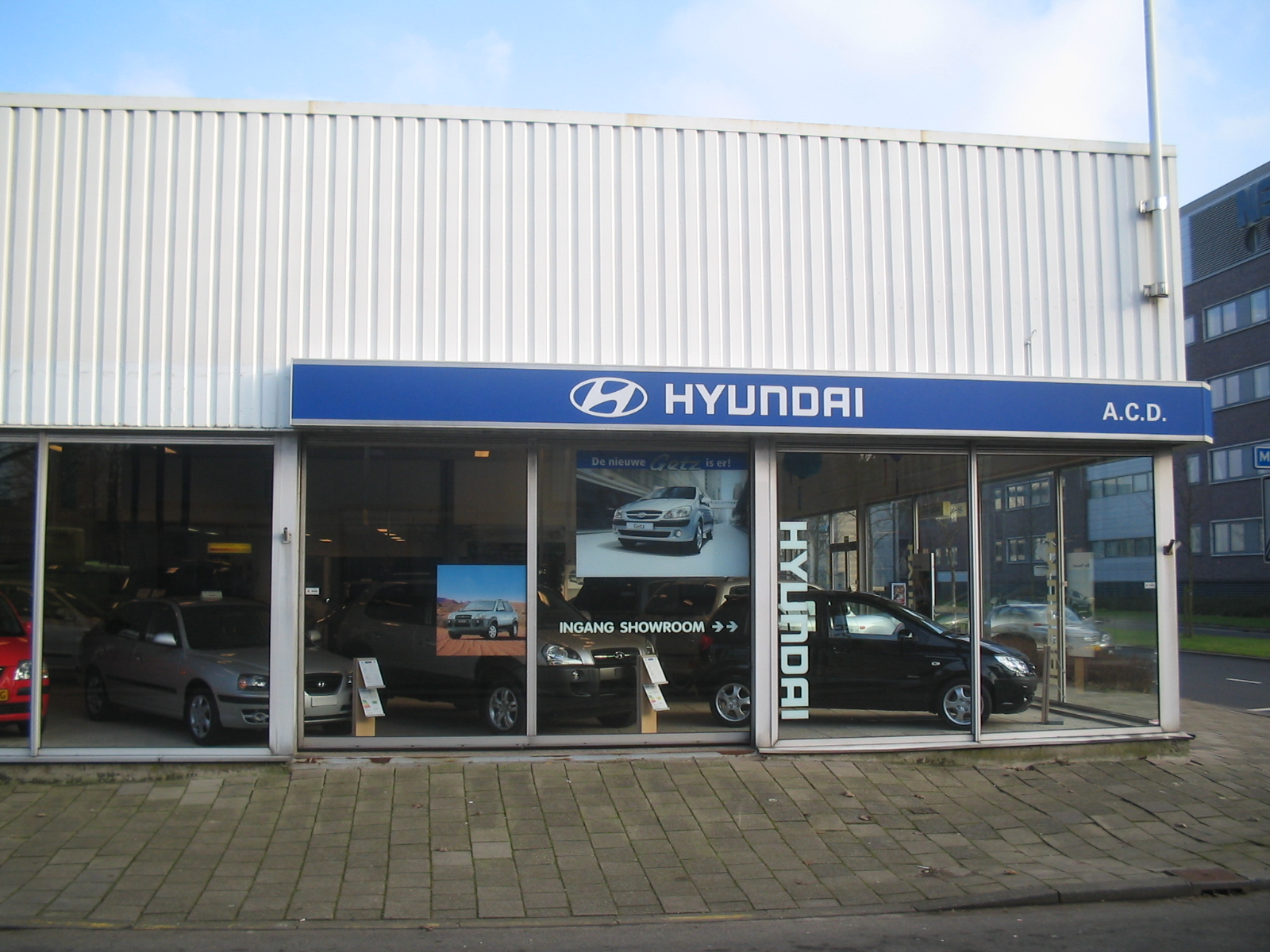 Hyunday dealer in Delft